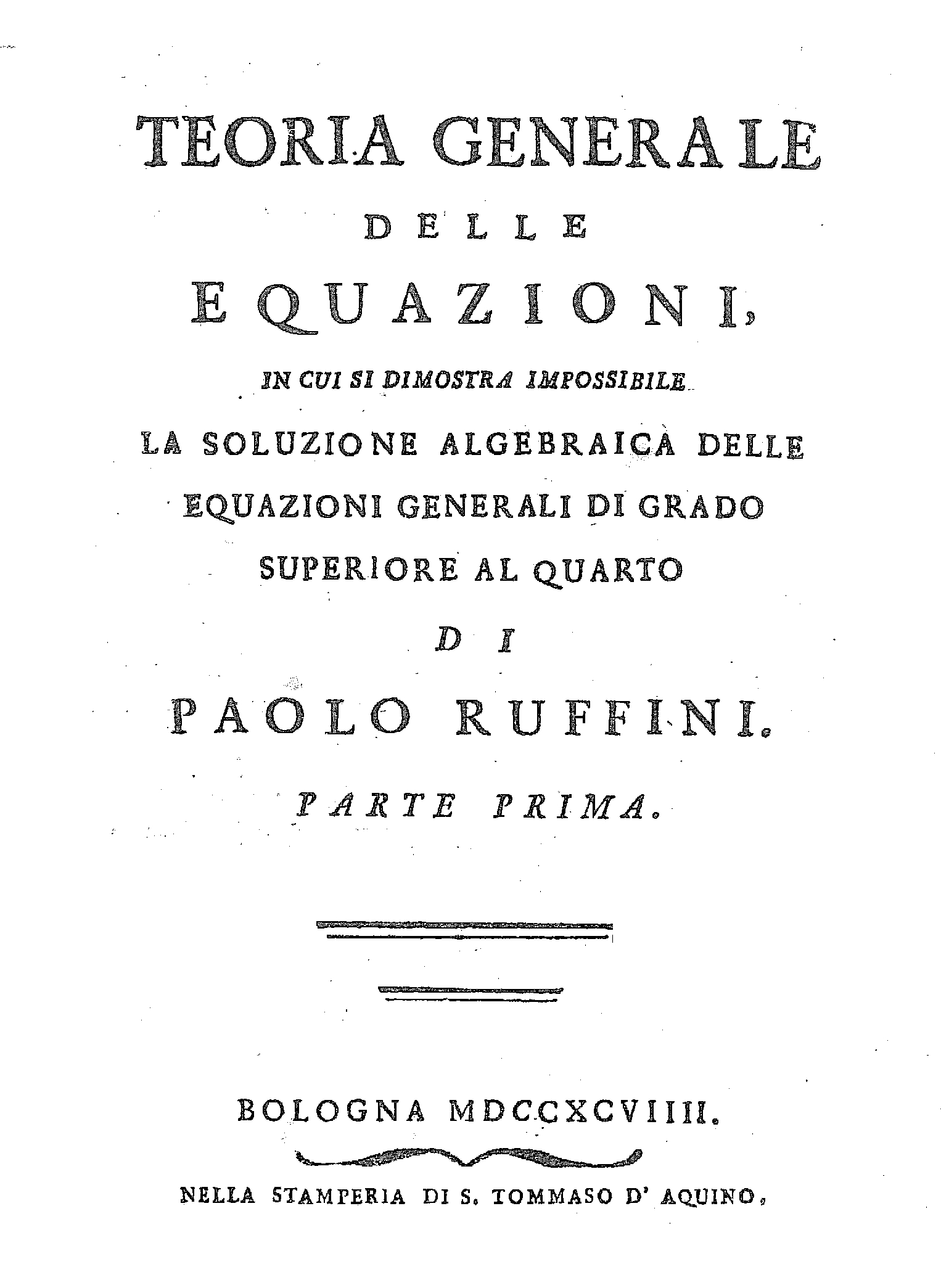 Teoria generale delle equazioni, in cui si dimostra impossibile la soluzione algebraica delle equazioni generali di grado superiore al quarto di Paolo Ruffini. Parte prima [-seconda]. 1. - Bologna : nella stamperia di S. Tommaso d'Aquino, 1799. - VIII, 206, [4] p. .